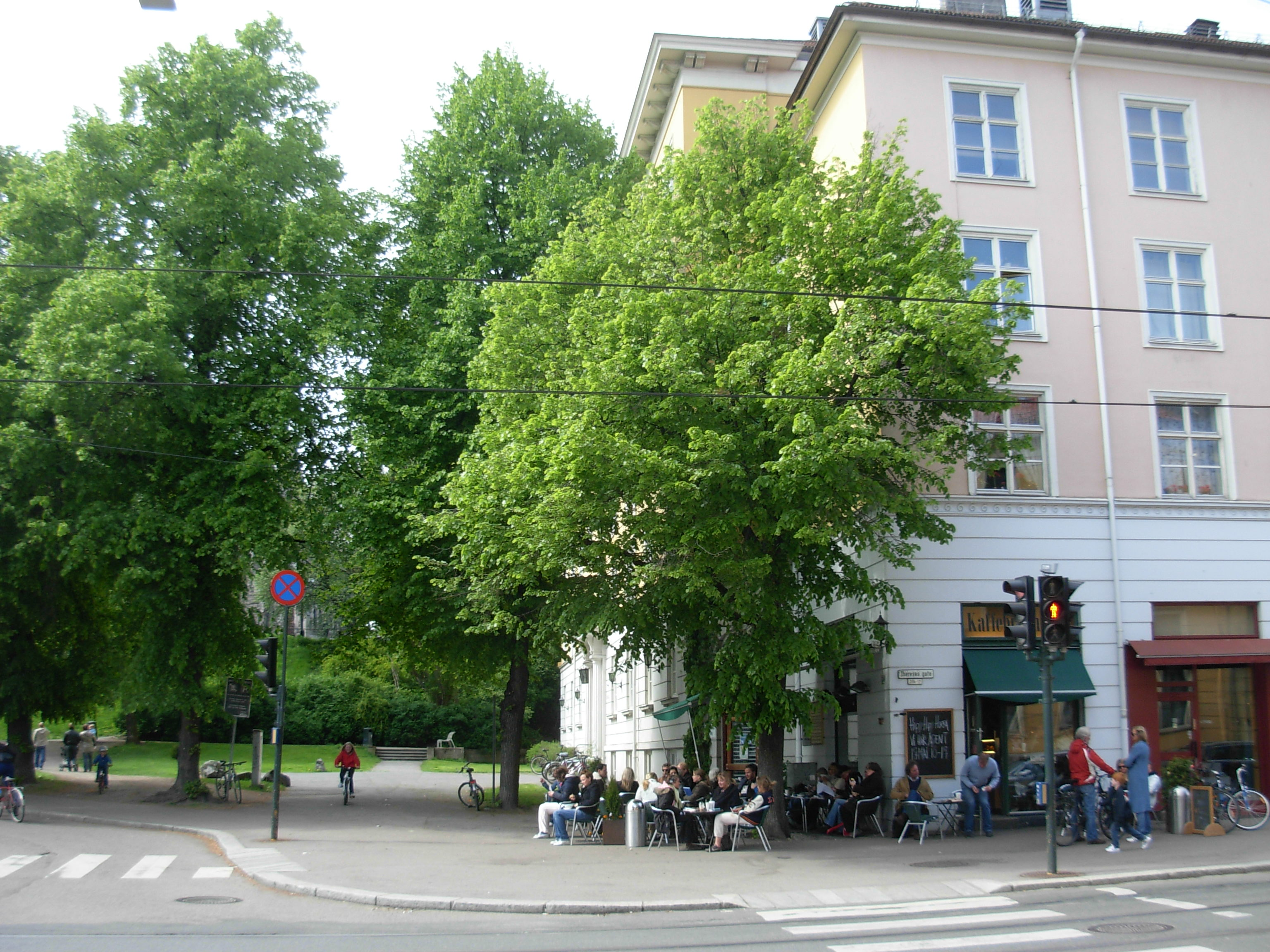 Kaffebrenneriet, Thereses gate, Oslo